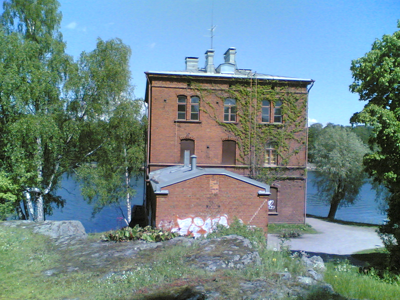 Lapinlahden sairaala alue